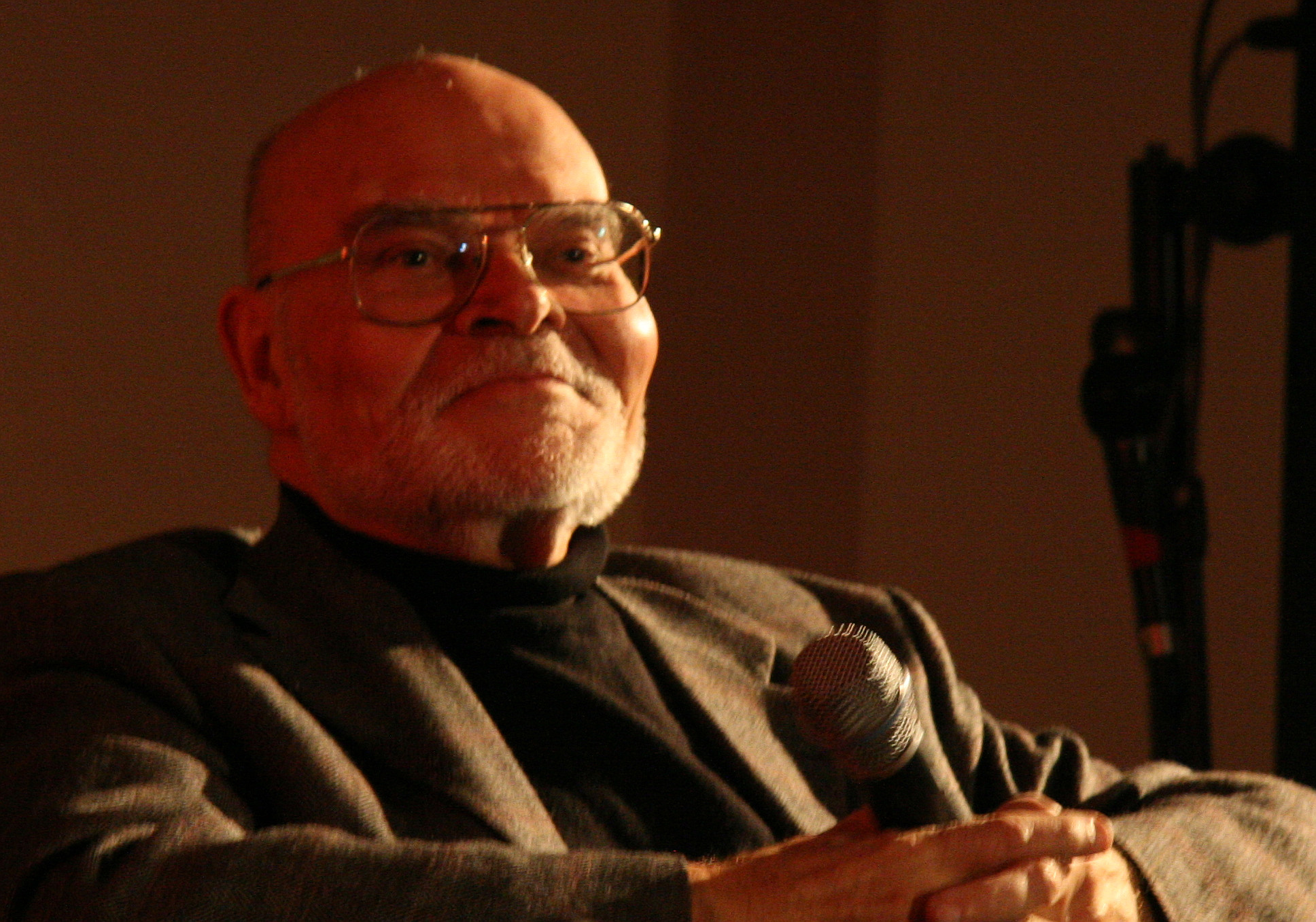 Peter Lösche bei "Stegner trifft..." am 4. Februar 2010 im Holsteiner Wirtshaus in Kiel